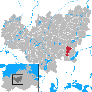 Hohen Demzin in Mecklenburg-Vorpommern - District Güstrow